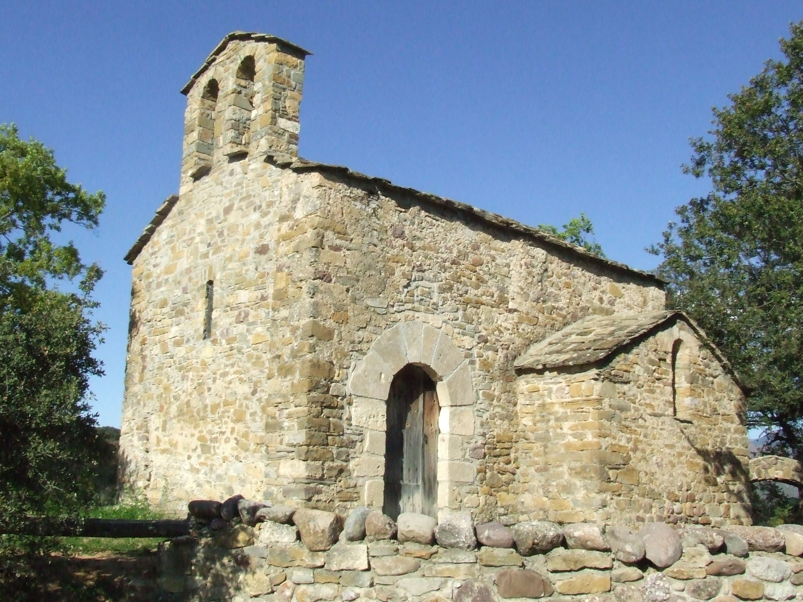 Església romànica de Santa Bàrbara de Sensui, façana meridional (Salàs de Pallars, Pallars Jussà)